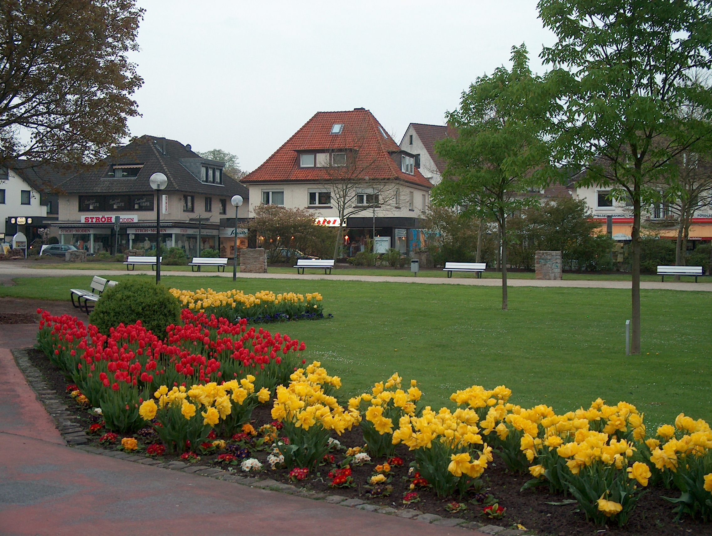 Tulpenblüte in Bad Rothenfelde.